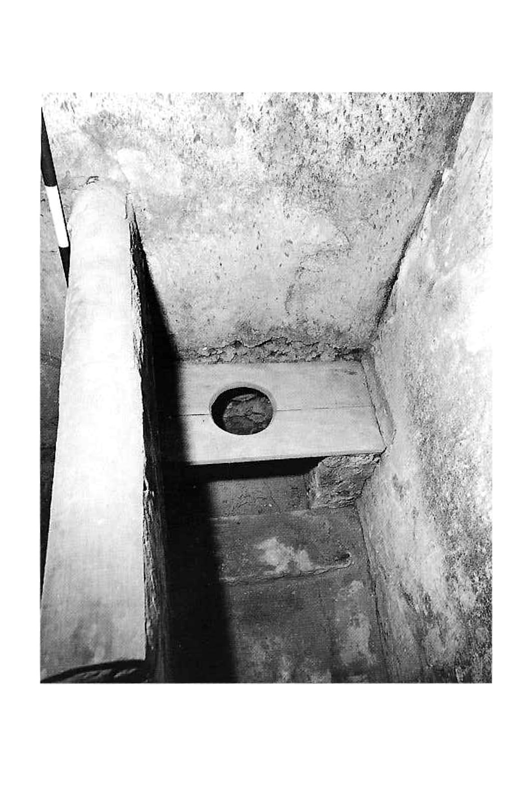 Retrete de la época en un lupanar de Pompeya